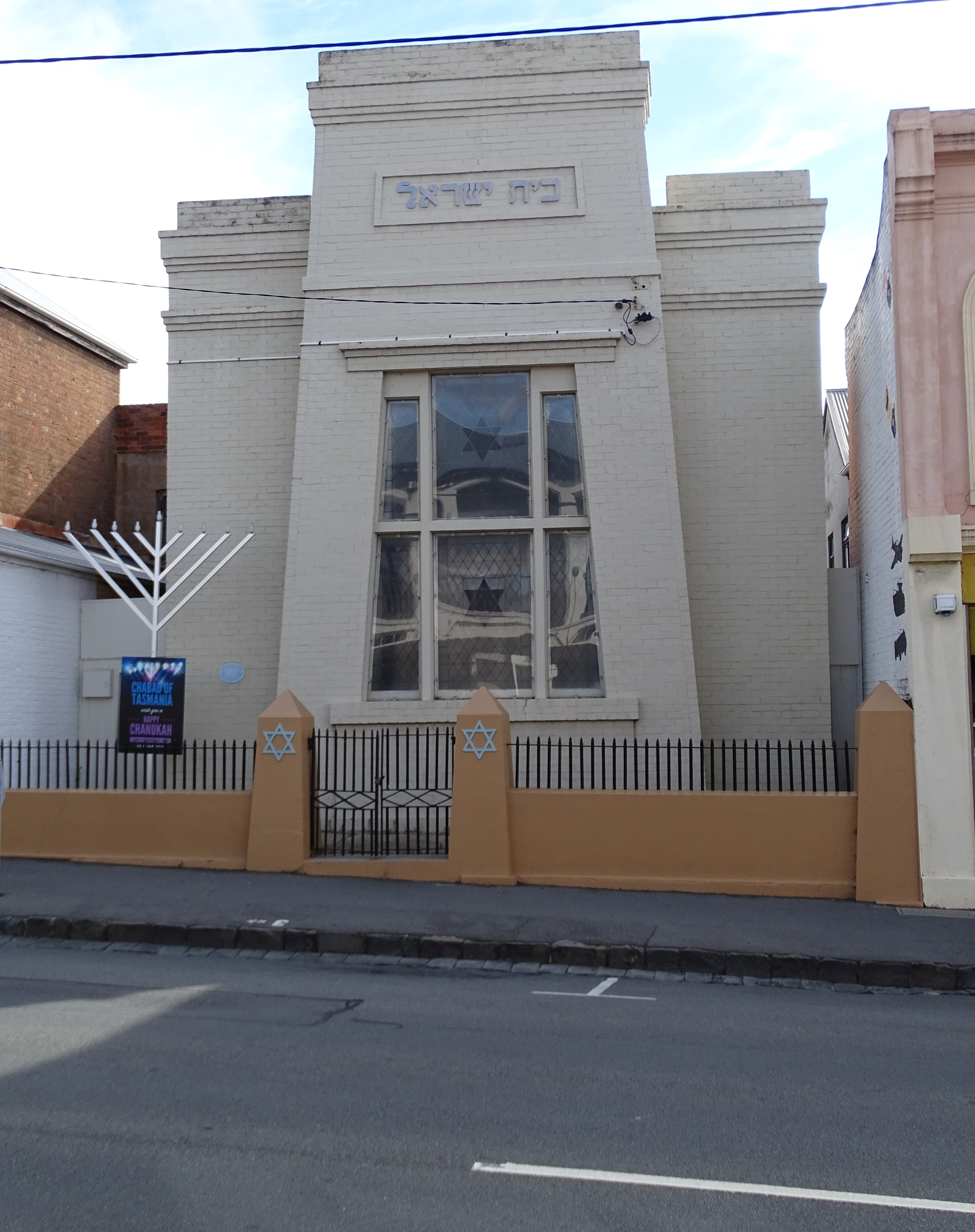 Synagoge in Launceston, St. John Street